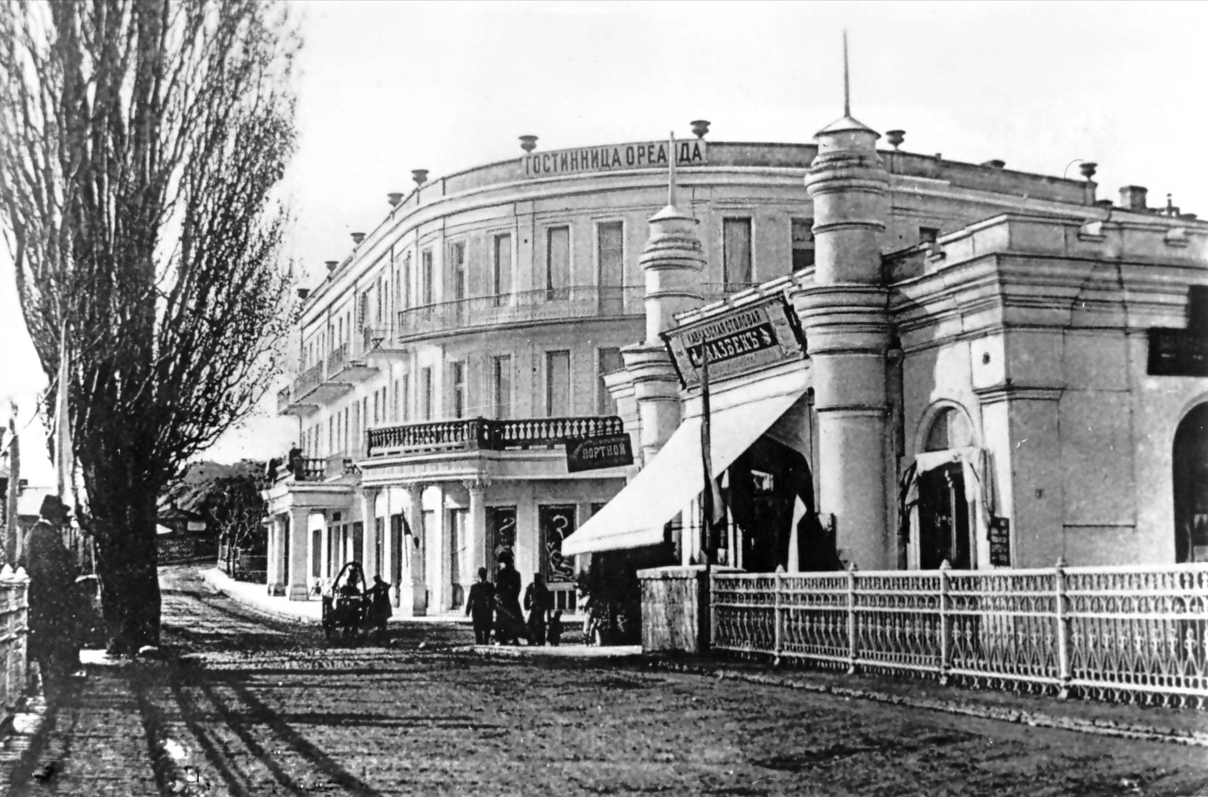 Ялта. Гостиница Ореанда в начале 20 века